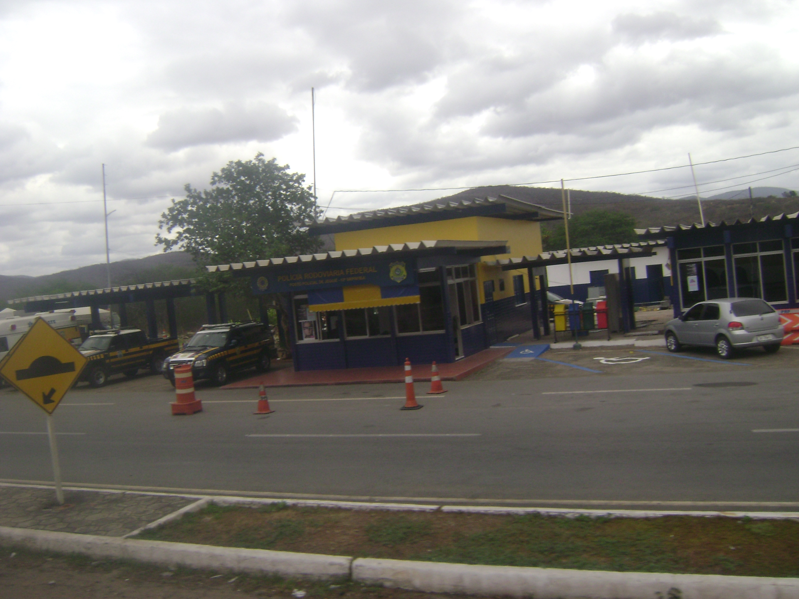 Posto da Polícia Rodoviária Federal em Jequié, Bahia, Brasil.